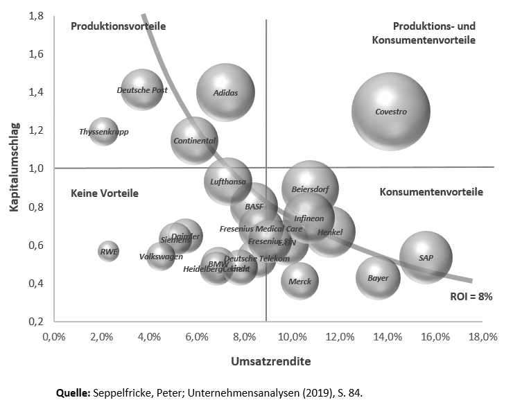 Die Abbildung habe ich selber mit Powerpoint angefertigt. Die Daten beruhen auf der angegebenen Quelle. Es besteht kein Urheberkonflikt.